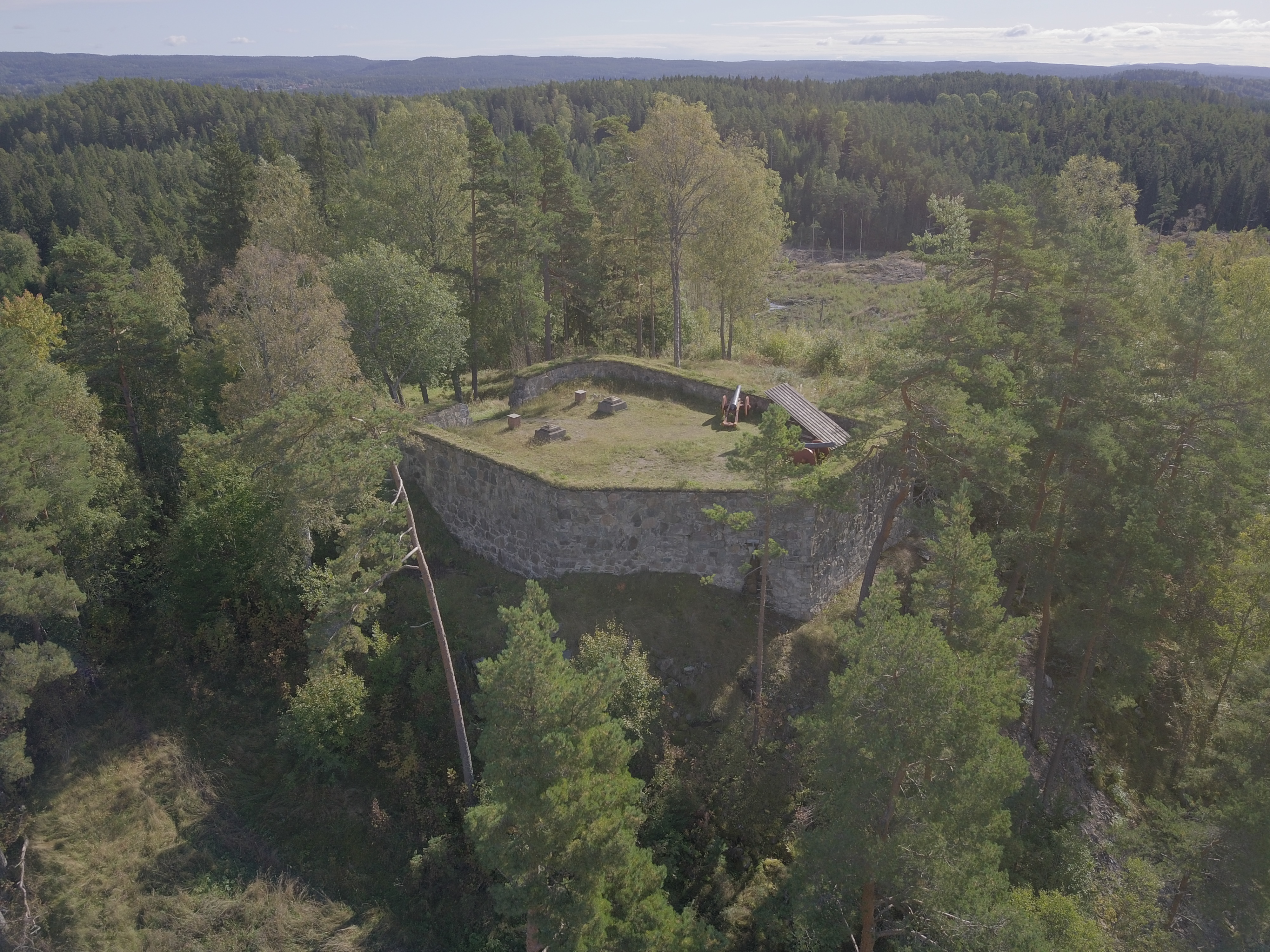 Basmo festning i Marker kommune